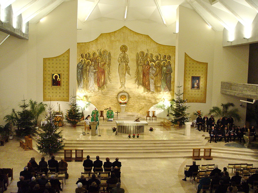 Kościół św.Brata Alberta w Busku-Zdroju, wnętrze, msza w dniu 2008-01-20, widok z chóru na ołtarz.